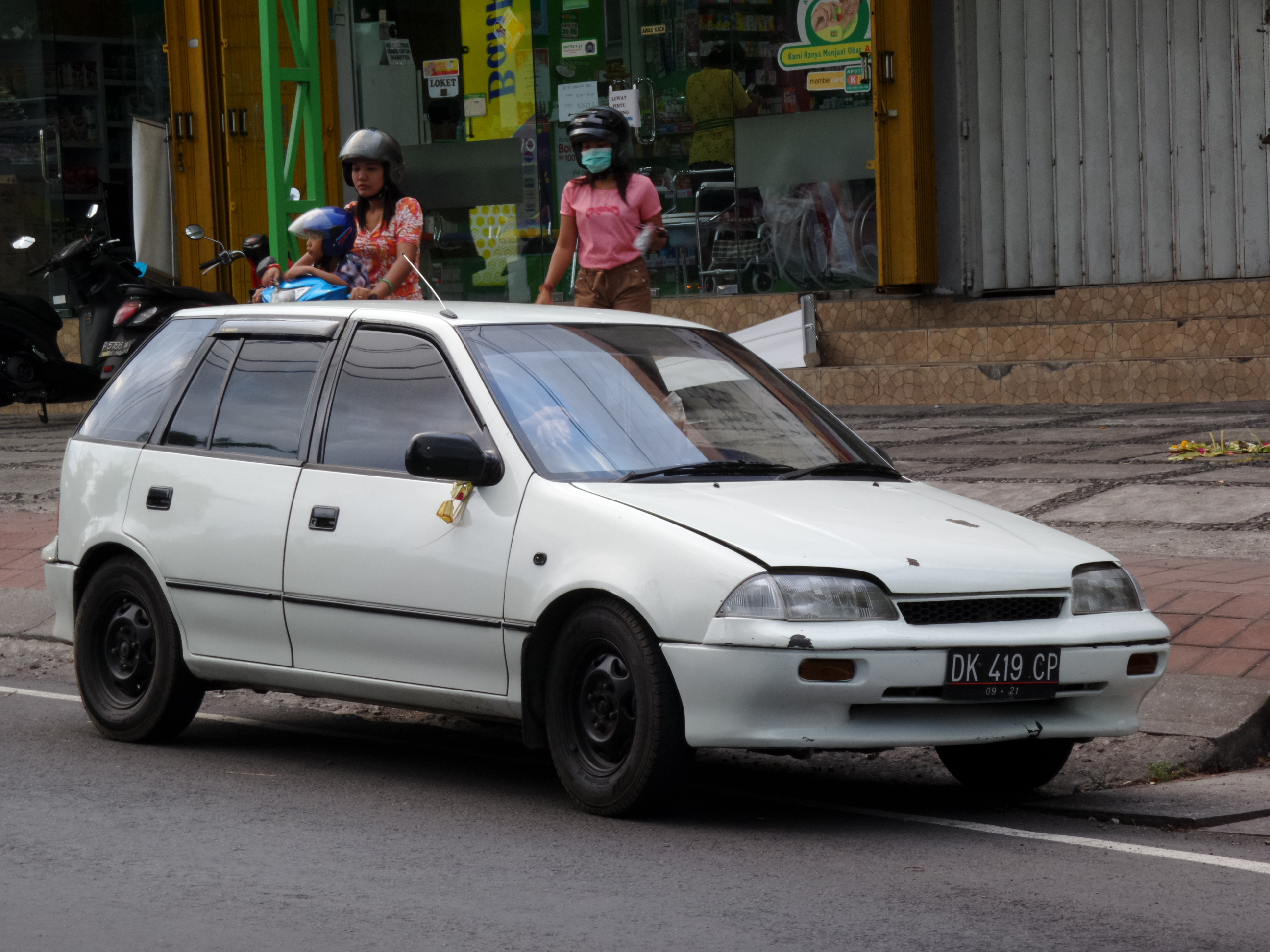 Suzuki Forsa Amenity